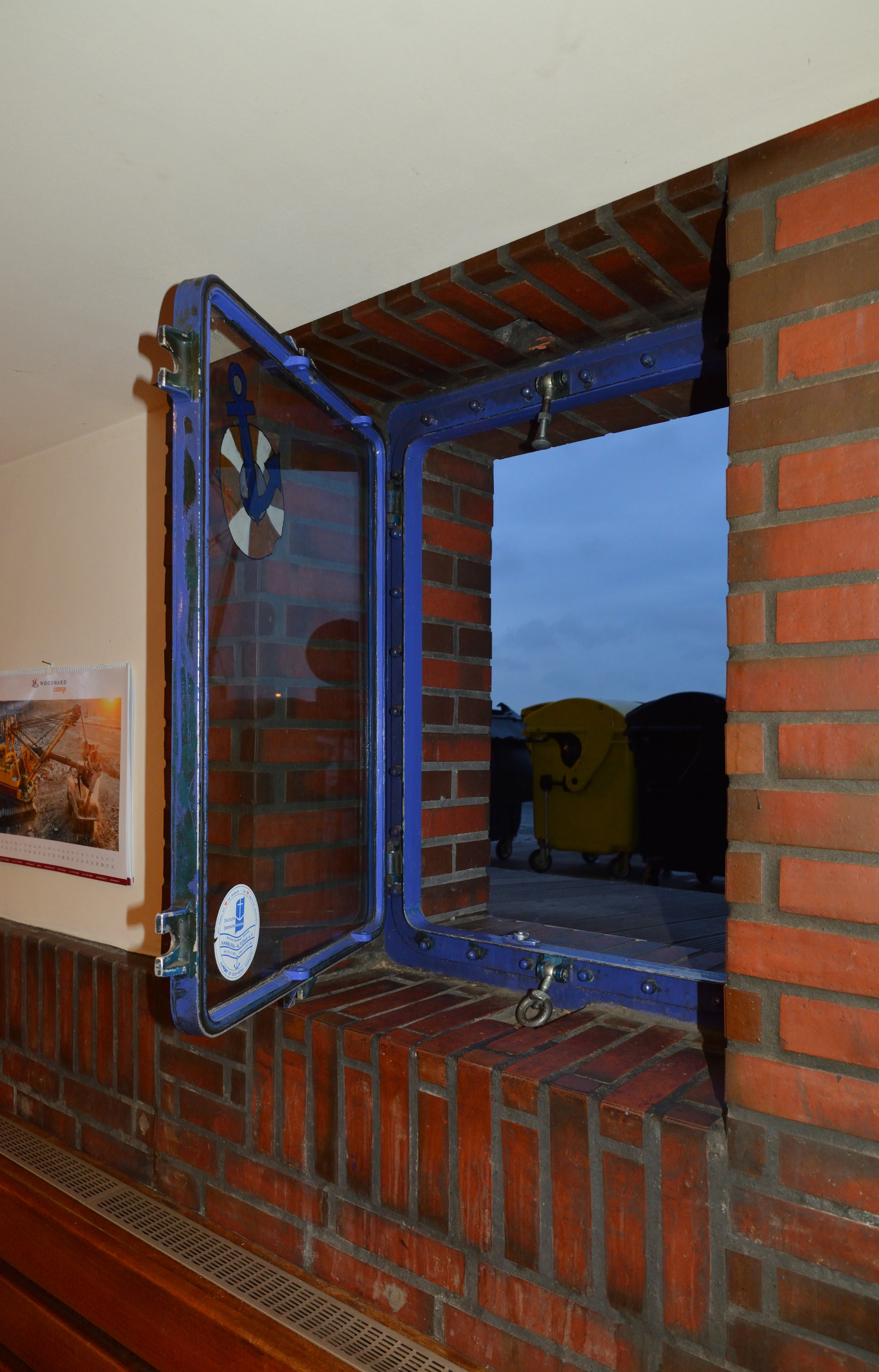 Impressionen eines Wochenendes in Hamburg mit dem Titel: Wikipedia:AhoiFlutschutz an der Semannsmission in Hamburg-Altona. Die Fenster bestehen aus Panzerglas.